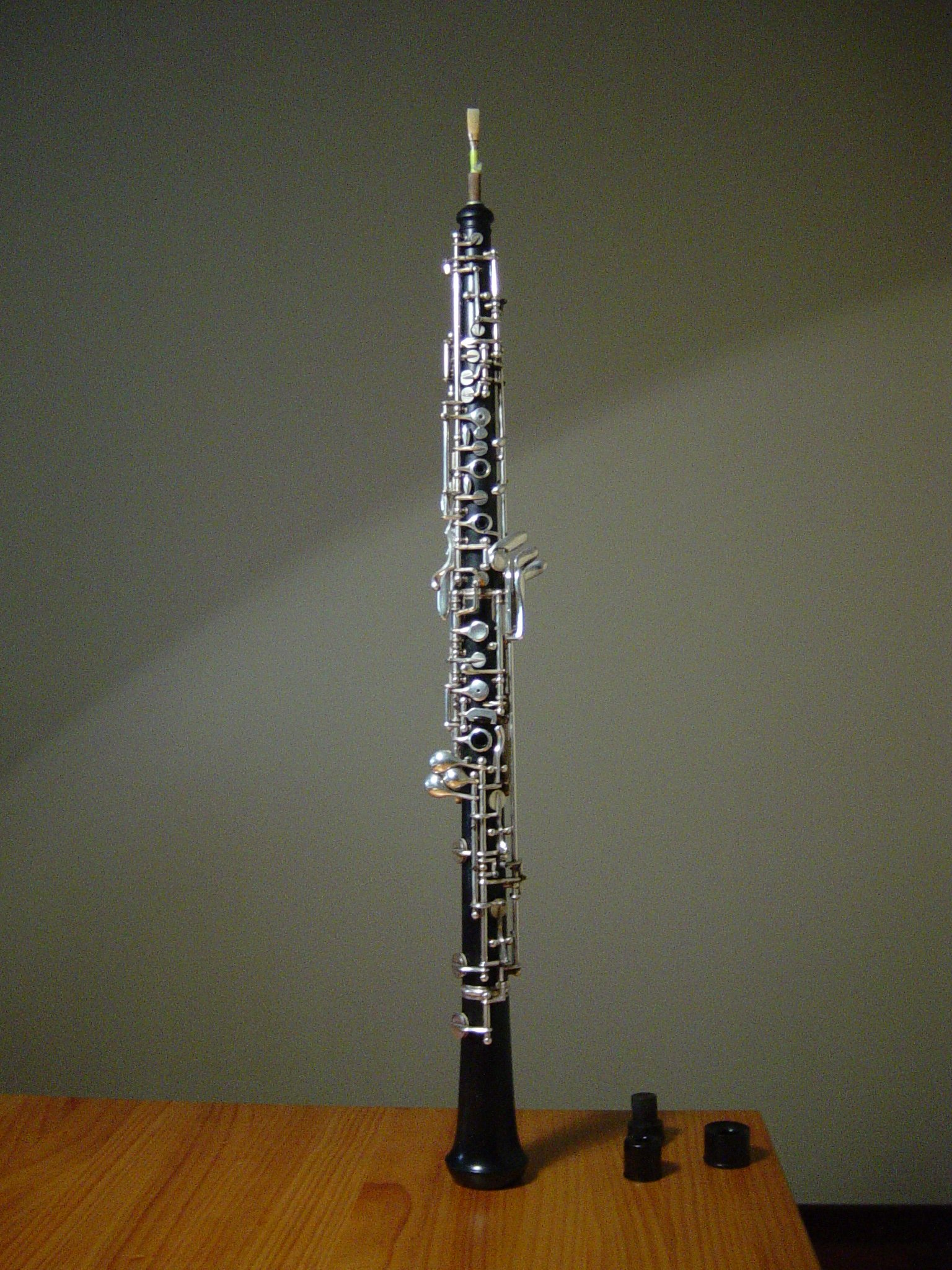 G. H. Muller assembled oboe; oboe G. H. Muller montado